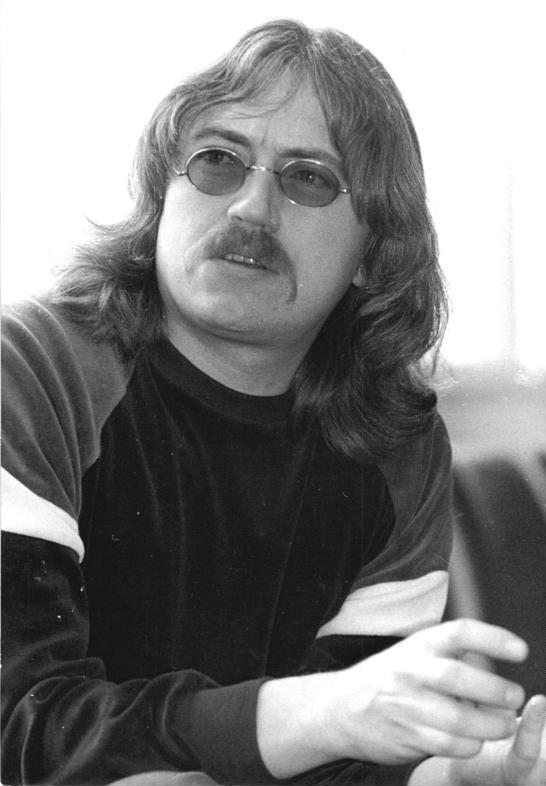 Reinhard Lakomy ADN-ZB / Zimmermann / 04.03.82 schl Berlin: An der Delegierten-Konferenz des Verbands der Komponisten und Musikwissenschaftler der DDR vom 18. bis 19. Februar 1982 nahm der bekannte Komponist Reinhard Lakomy teil. Abgebildete Personen: Lakomy, Reinhard: Sänger, Komponist, DDR (GND 121996468)